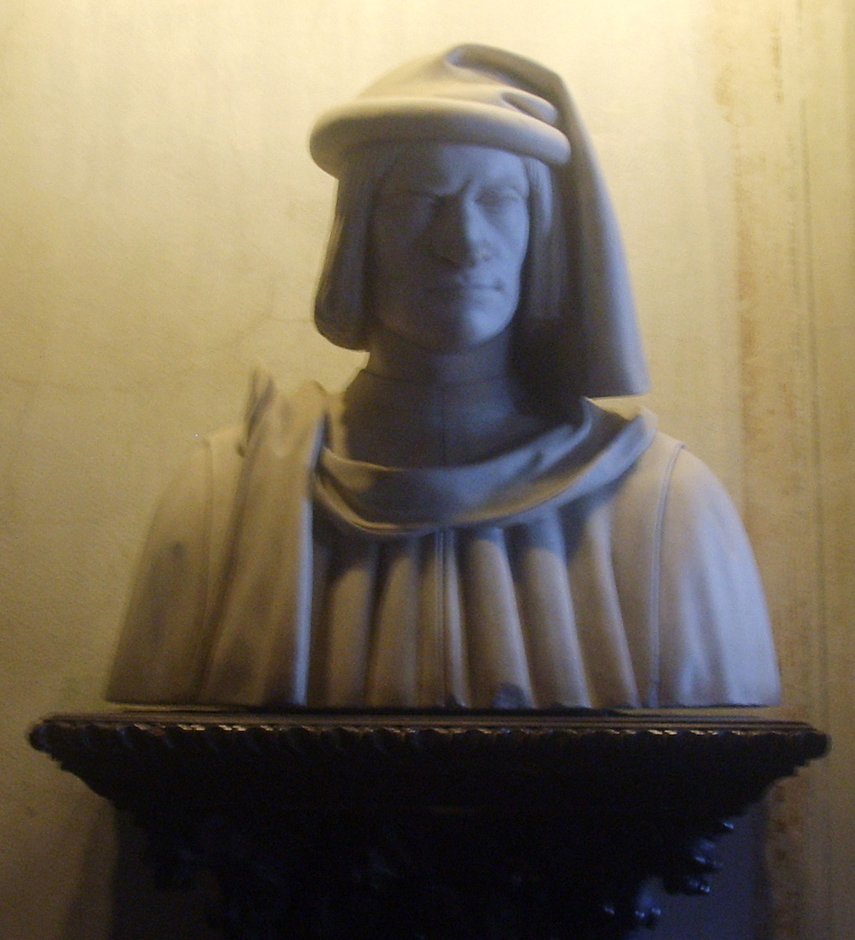 Busto di Lorenzo il Magnifico nella Villa di Careggi, Firenze